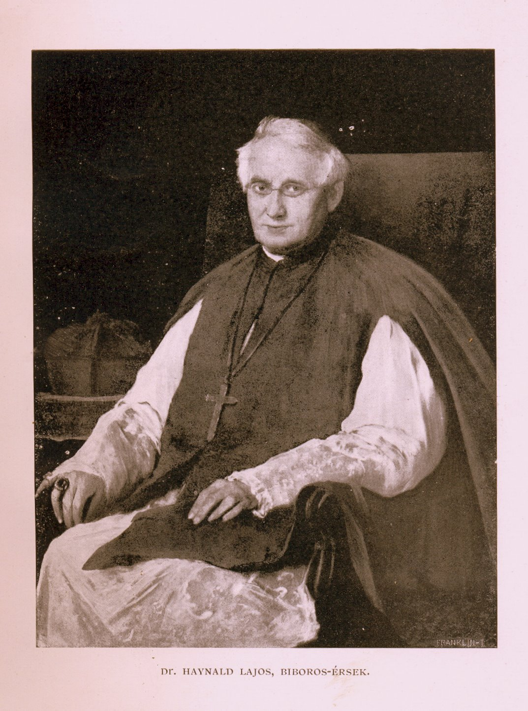 Munkácsy Mihály: Haynald Lajos bíbornok-érsek